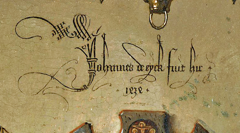 Dem Jan van Eyck (c. 1390-1441) seng Signatur matzen am Bild vun der "Arnolfini-Houchzäit"